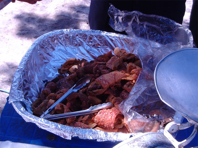 Chicharrones guatemaltecos.